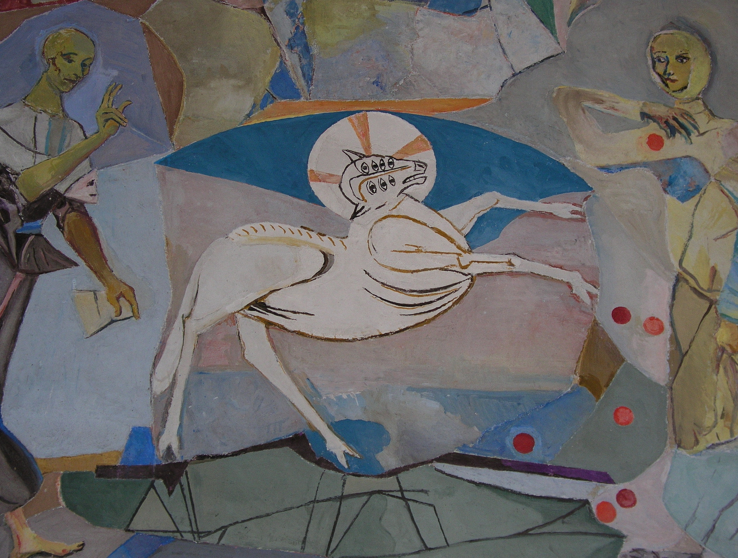 Basilika Seckau, Engelskapelle, Fresko "Seckauer Apokalypse" von Herbert Boeckl, 1952-1960: Das Lamm mit den sieben Augen